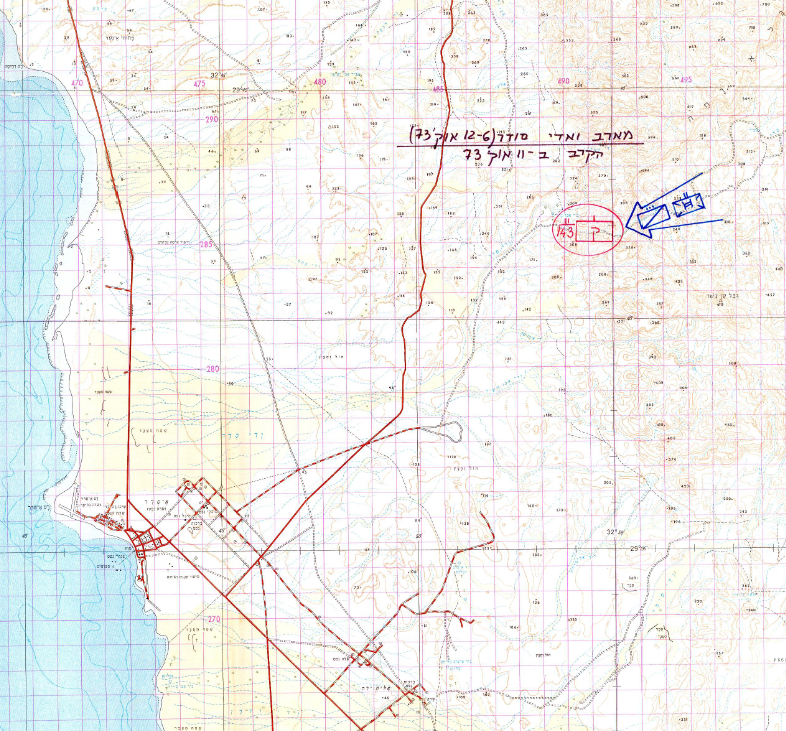 מארב הקומנדו המצרי באזור ראס סודר - 6-12 לאוקטובר 1973, הקרב ב11 לאוקטובר 1973